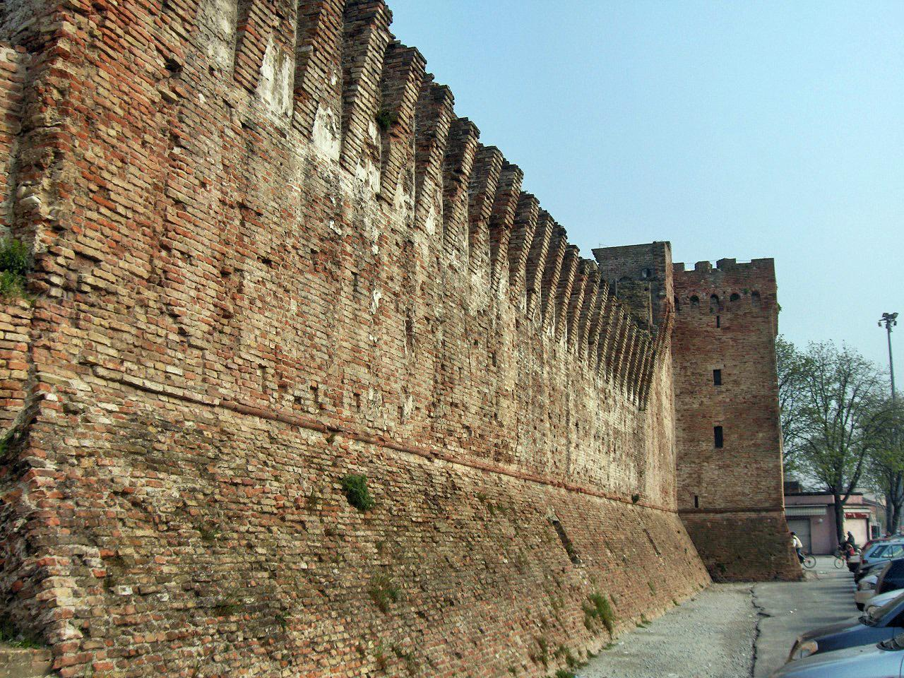 Rimini castle (Castel Sismondo) (1437-1446), Rimini, Italy